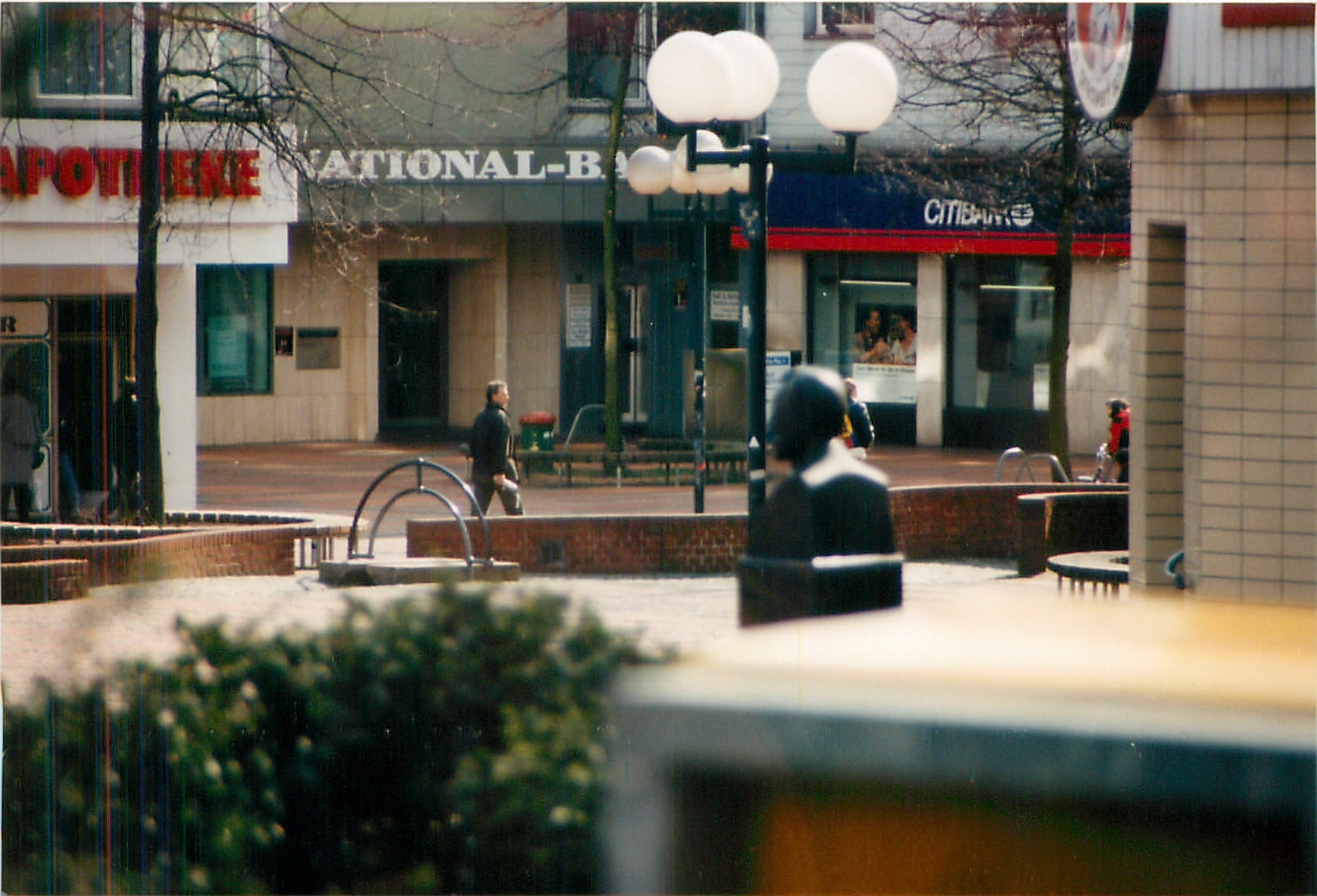 Steele, Essen, Germany